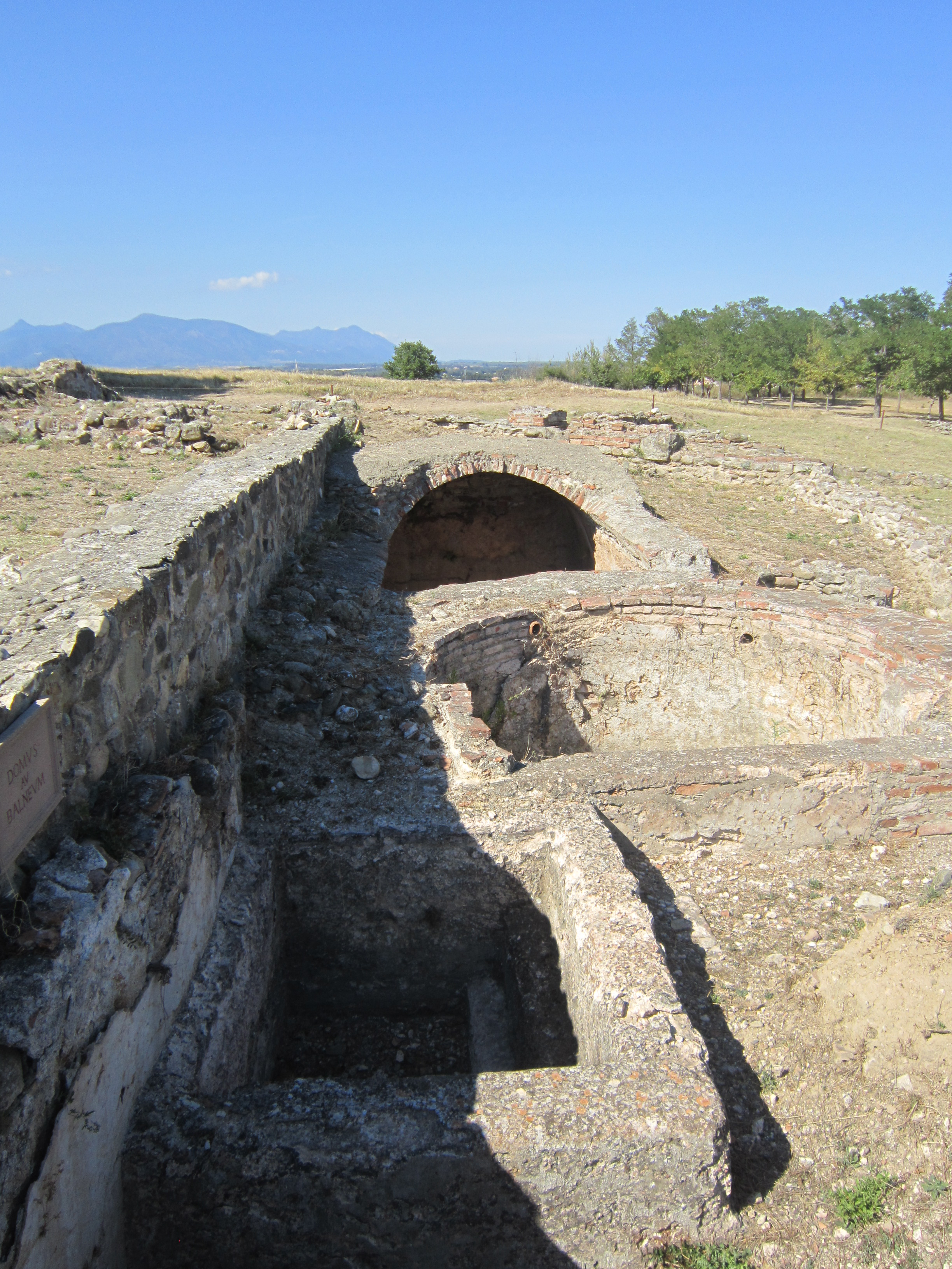 Ruines romaines d'Alalia